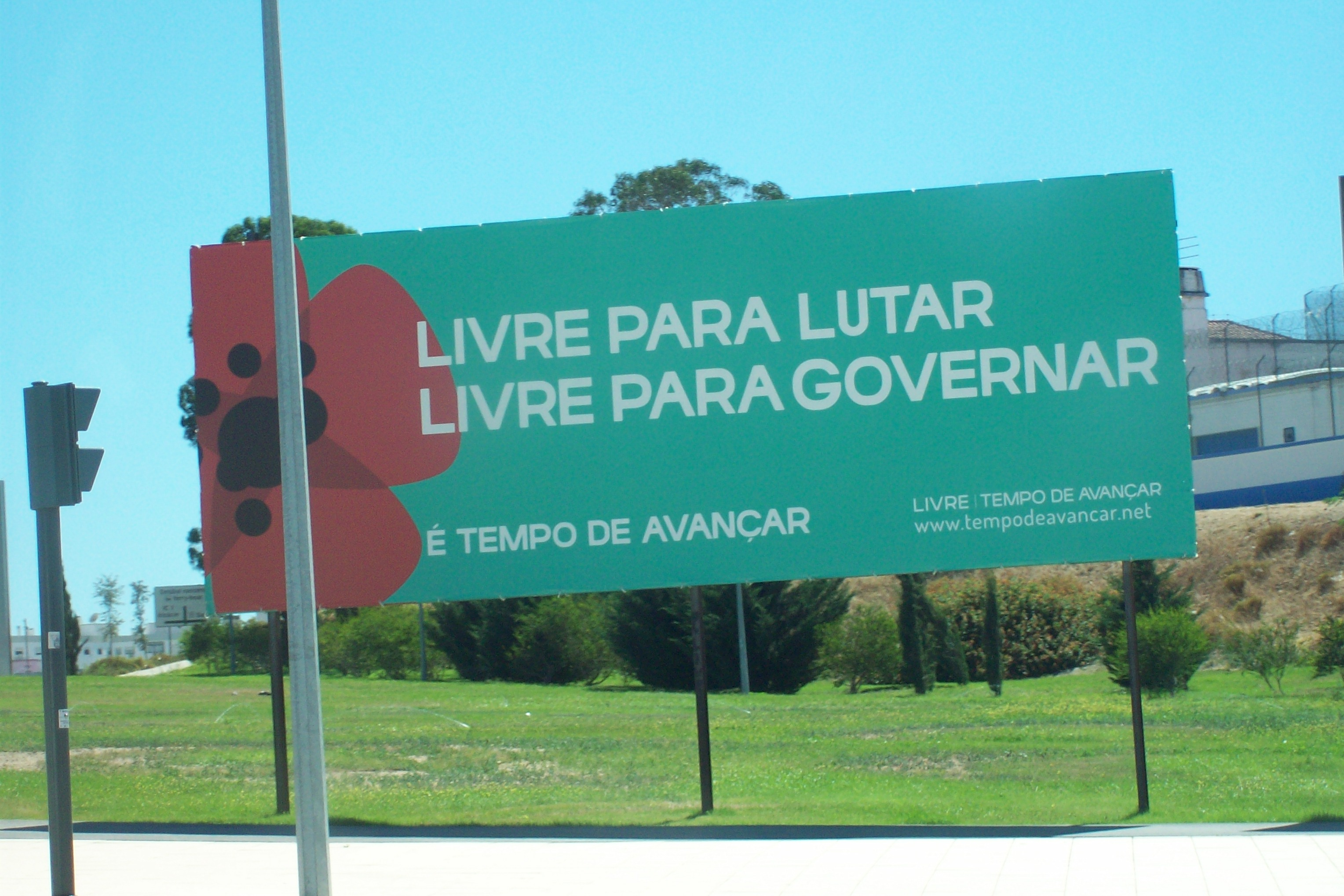 Cartaz da campanha eleitoral do Livre/TDA - Legislativas 2015